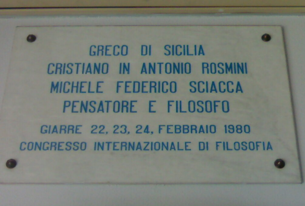 Plaque in memory of Michele Federico Sciacca, in Liceo classico "Michele Amari" Giarre.